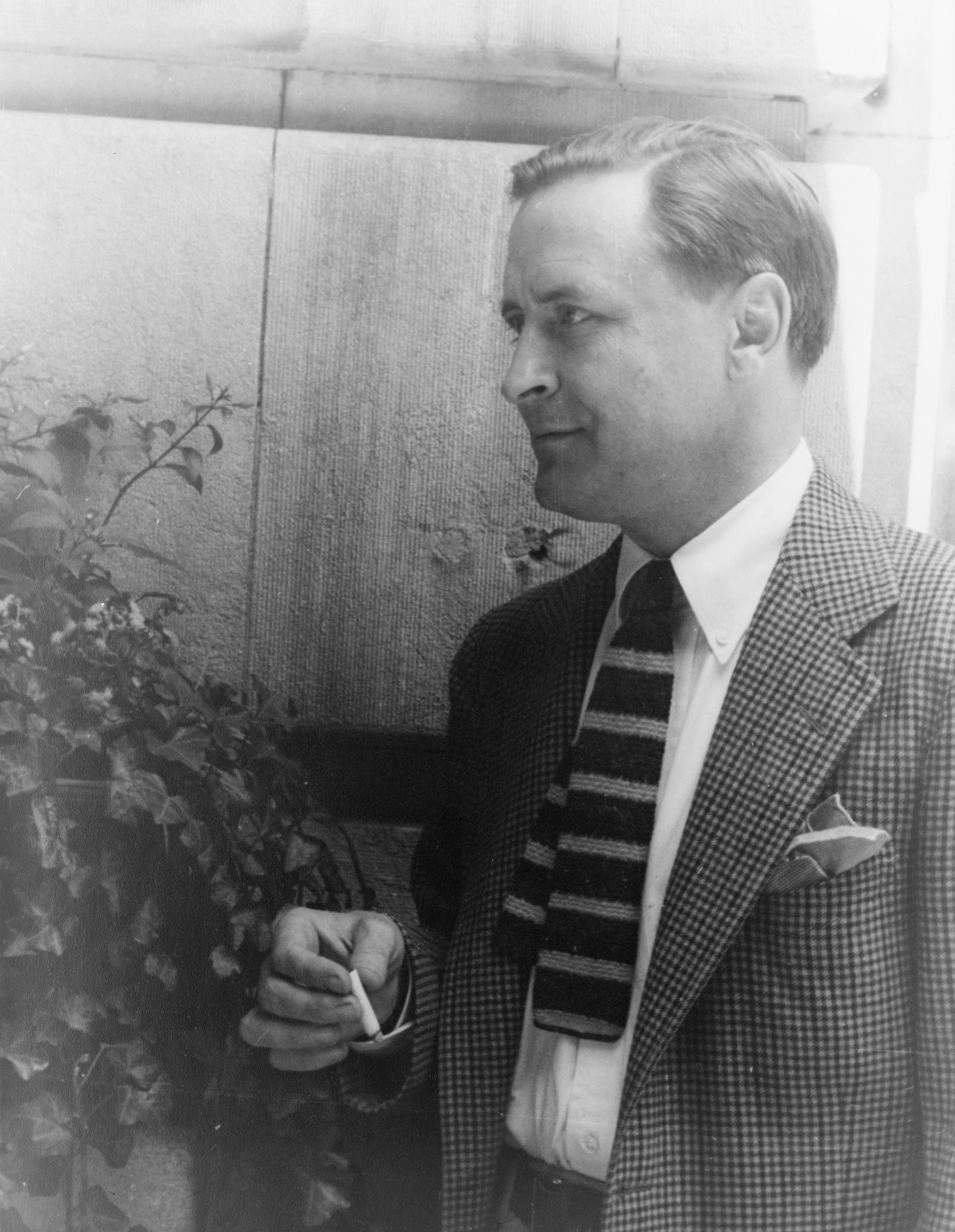 F. Scott Fitzgerald, 1937, June 4